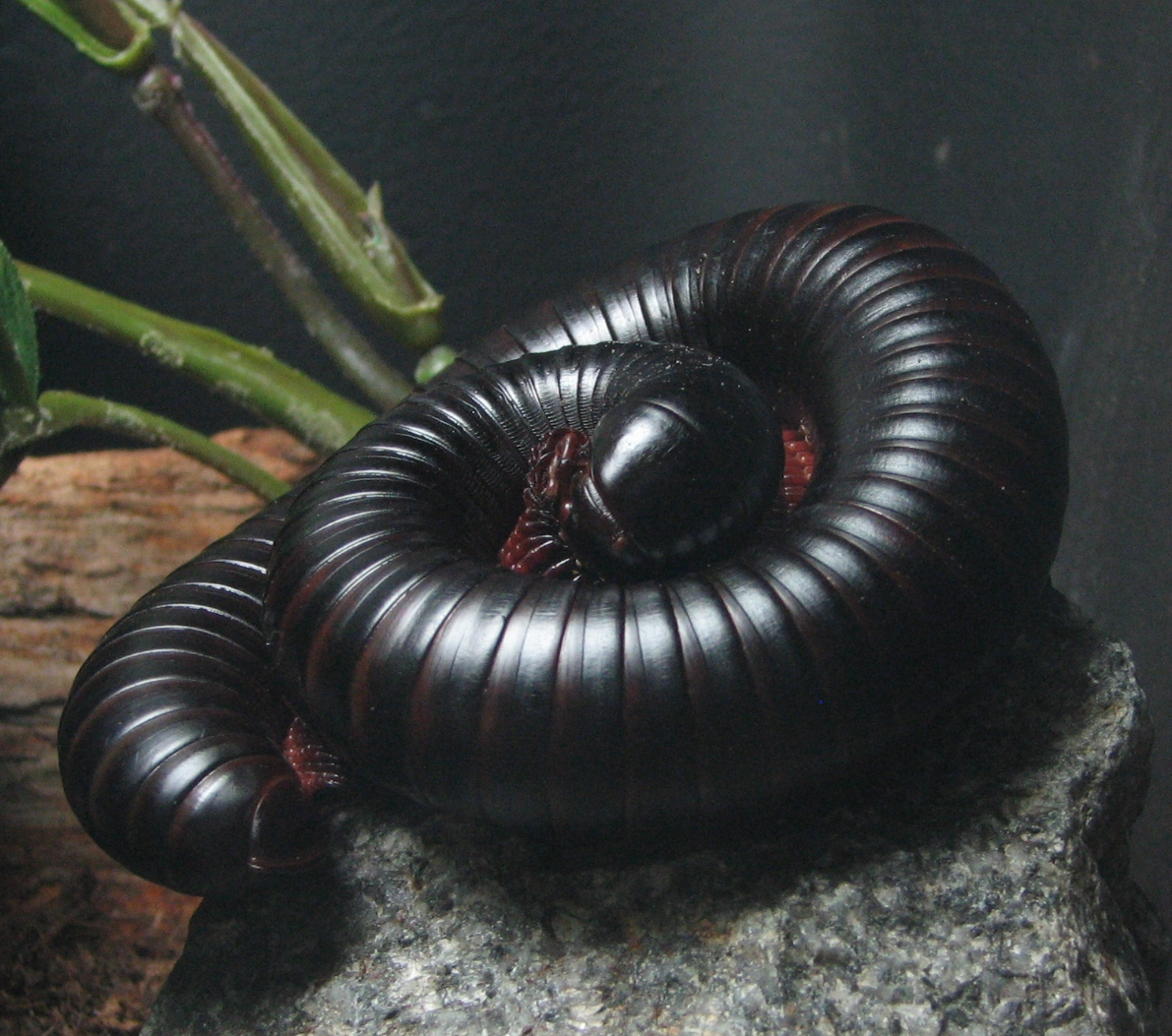 millipede